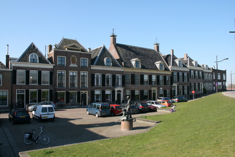 Ameide 7594-7598 - Voorstraat 4 tm 10 (foto voldoet niet, maar kon het niet meer deleten)